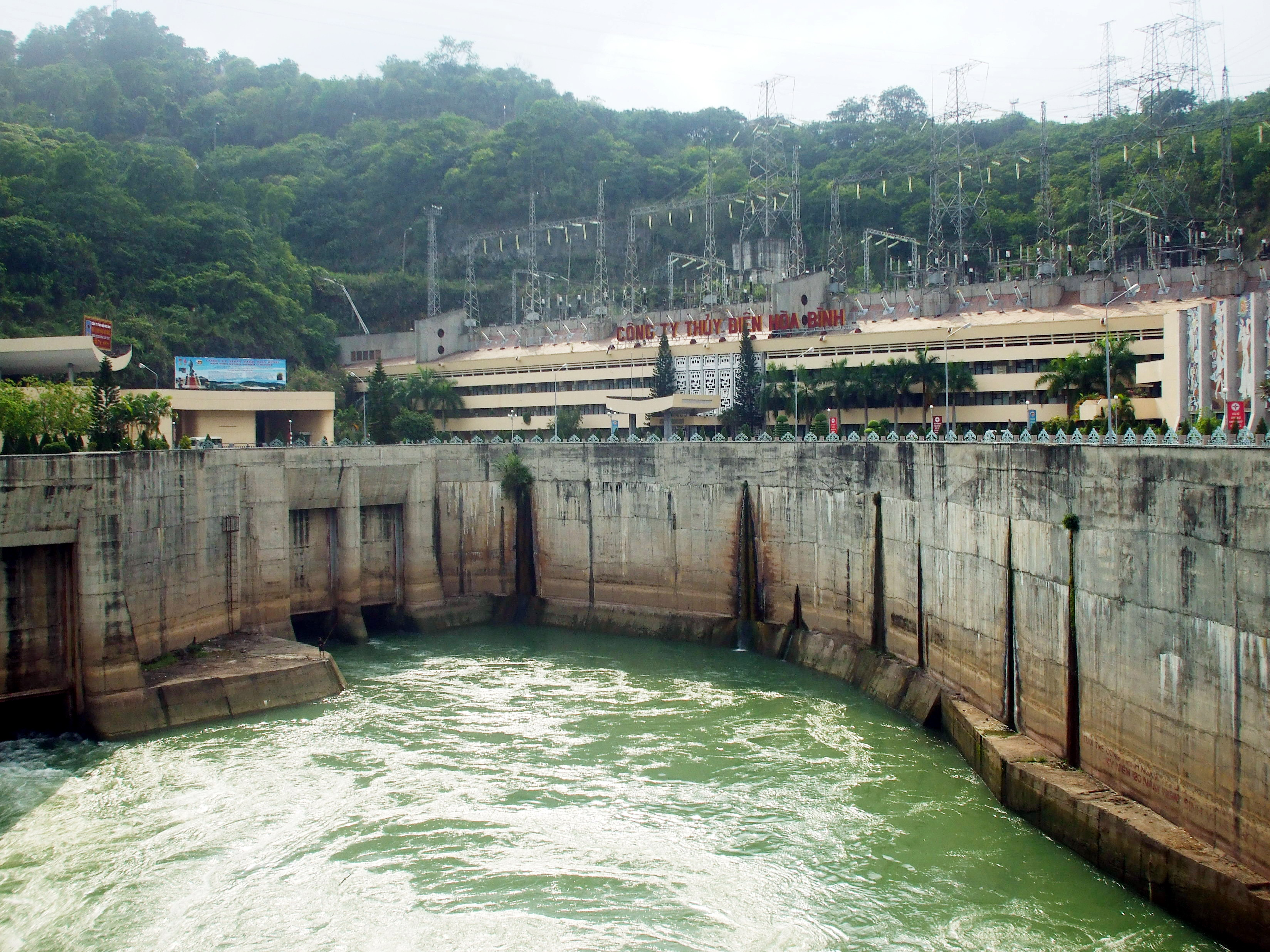 Nhà máy Thủy điện Hòa Bình, Việt Nam.